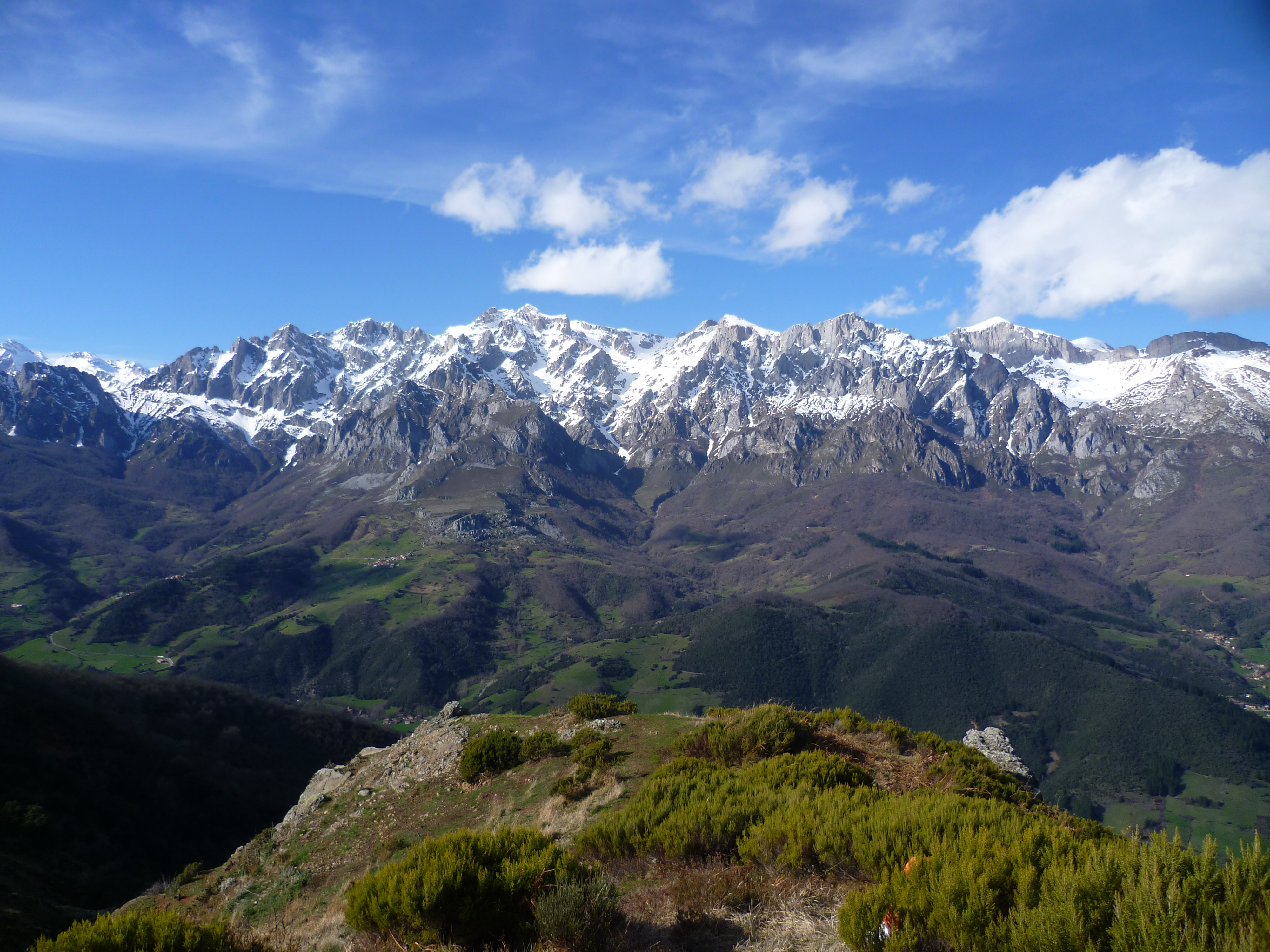 Liébana This is a photography of a Site of Community Importance in Spain with the ID: ES1300001. Natura2000 entry, EEA entry